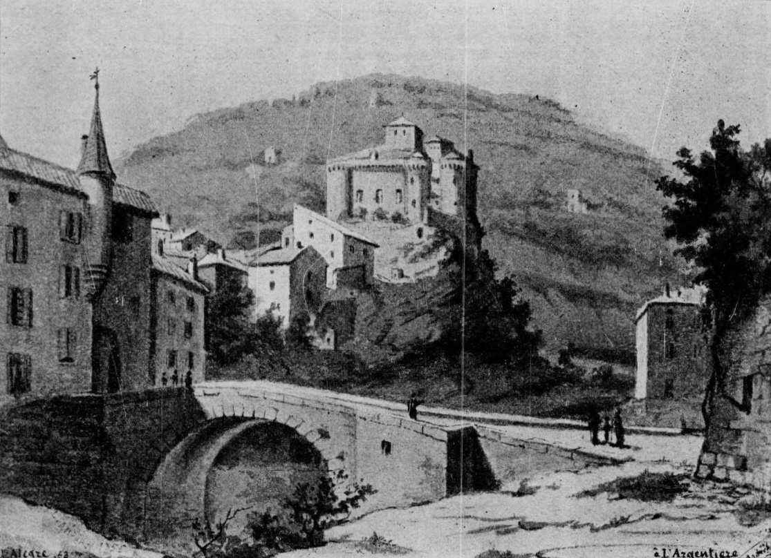 Die Burg Largentière im 19. Jahrhundert